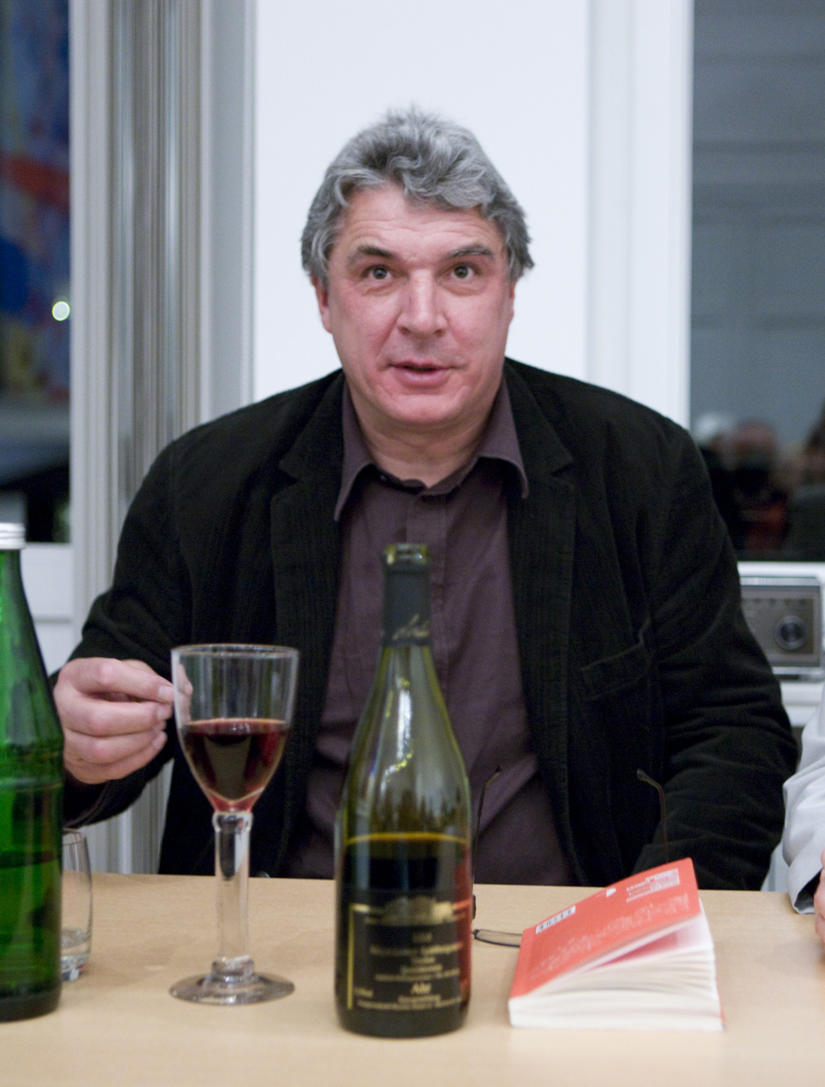 Stasiuk, Andrzej, Bonn, 6. Maerz 2008